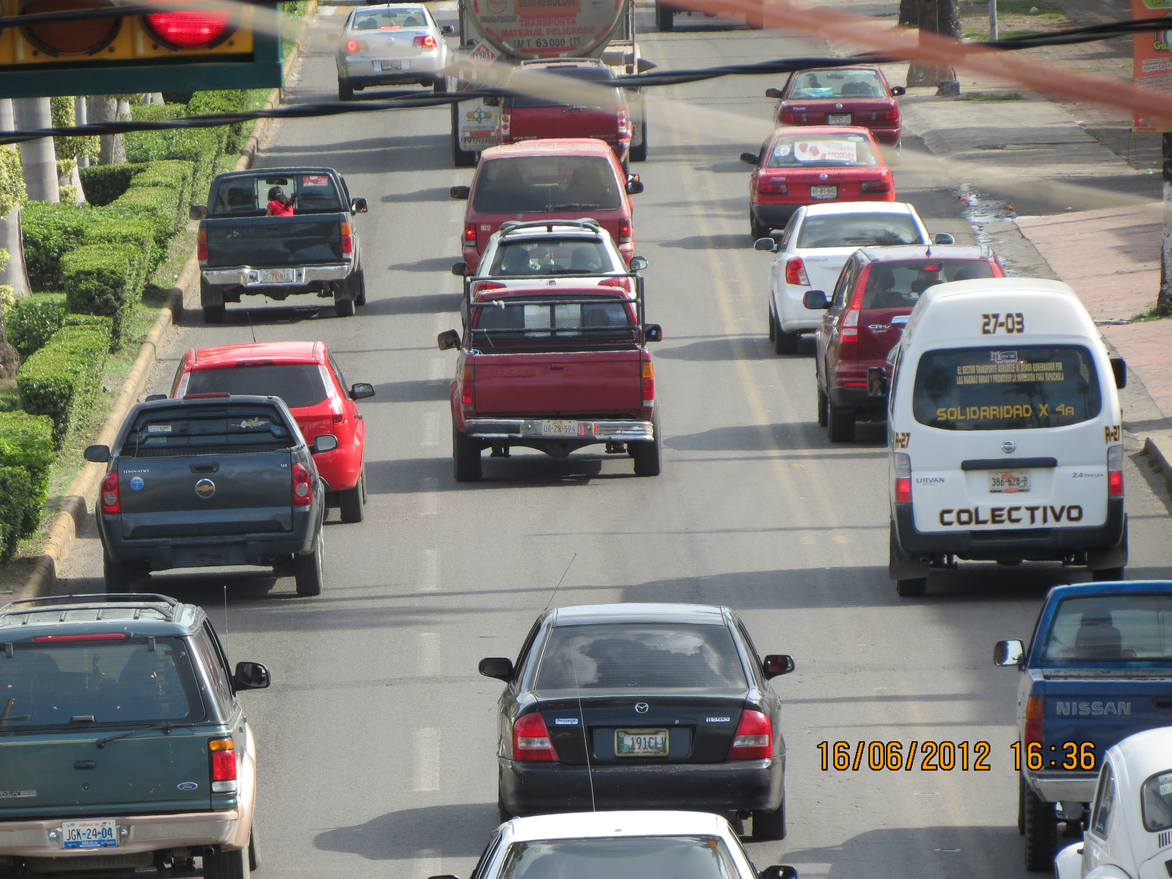 Tráfico metropolitano de la Ciudad de Tapachula